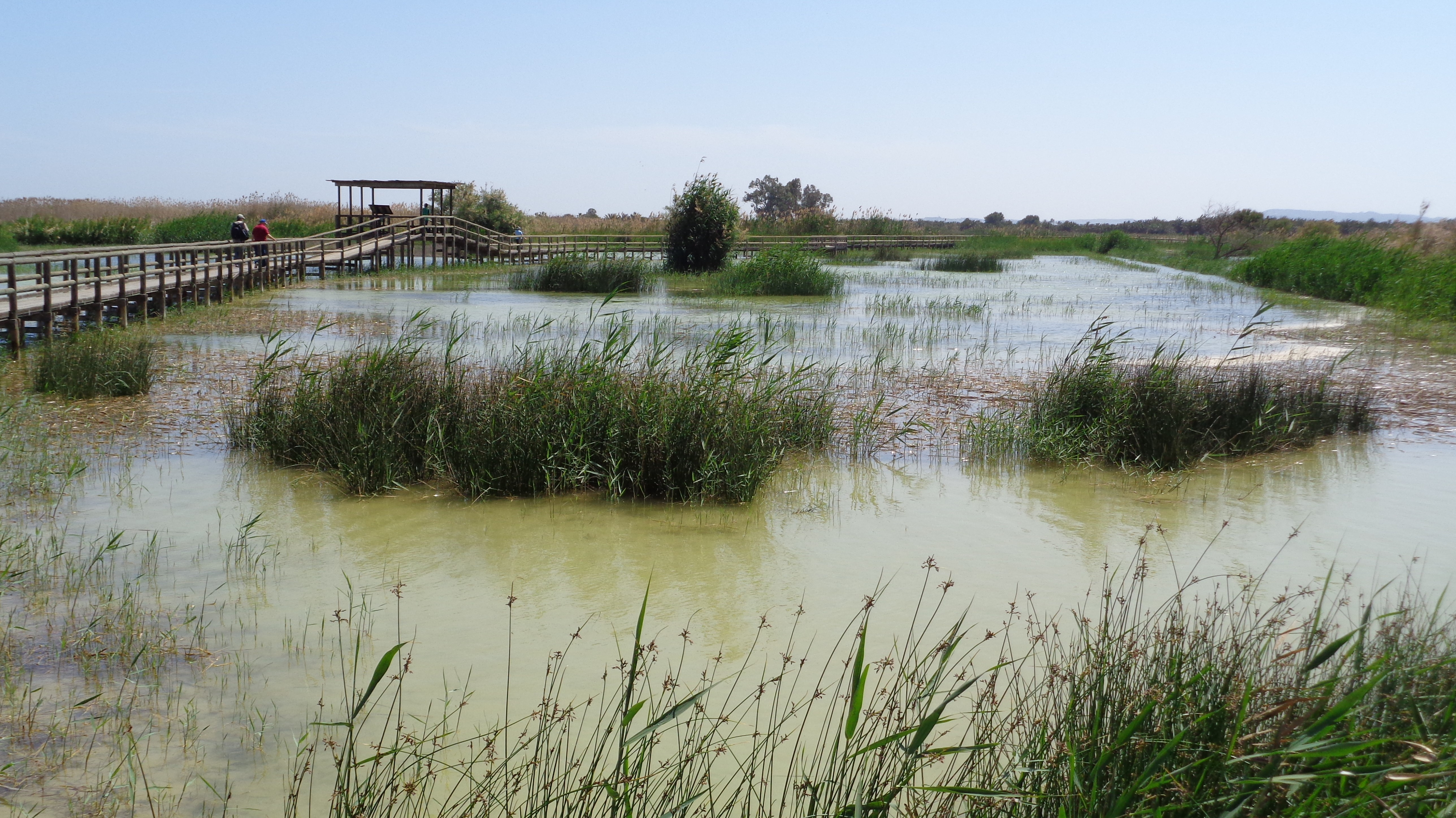 Parque natural de El Hondo This is a photography of a Special Area of Conservation in Spain with the ID: ES0000058. Natura2000 entry, EEA entry